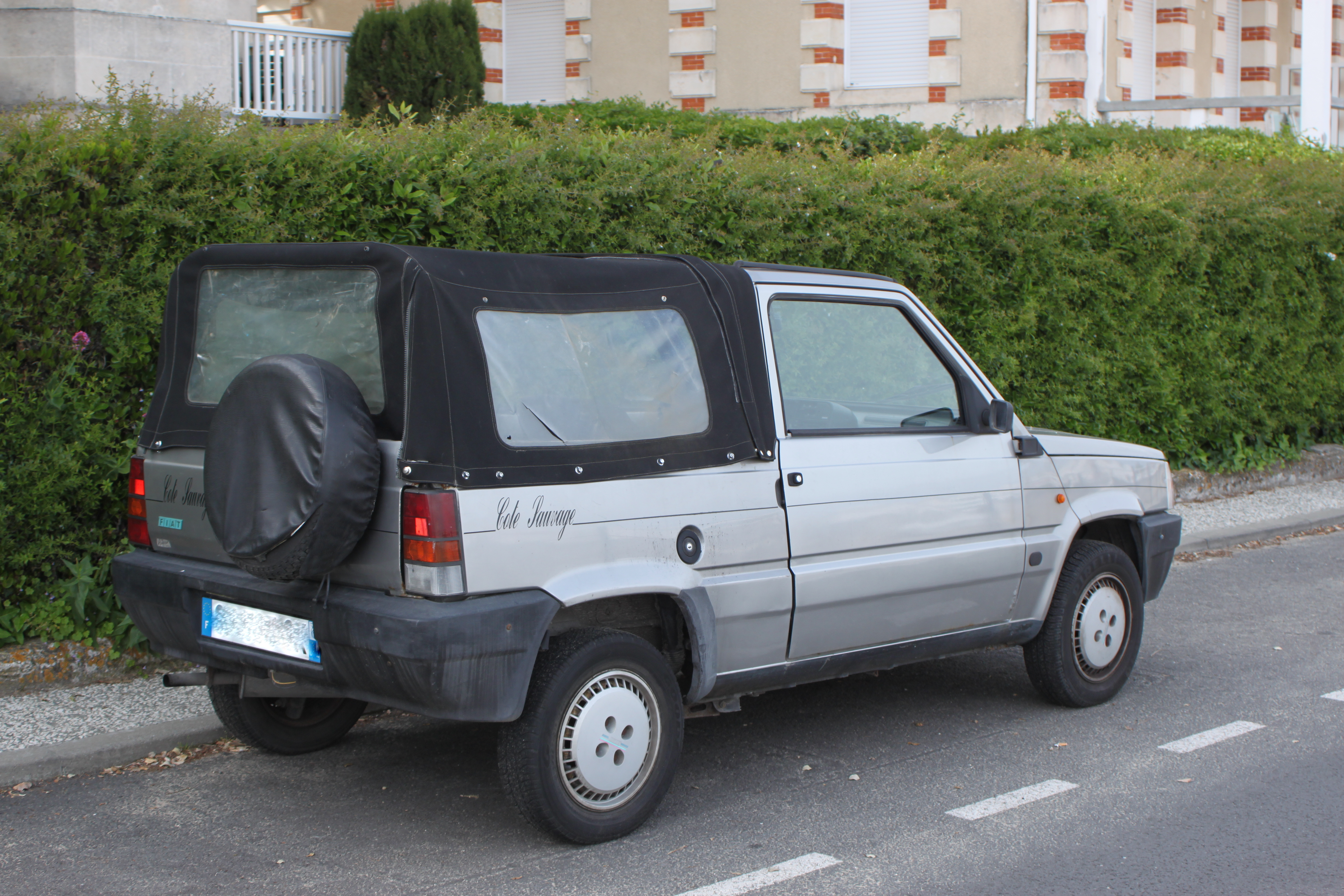 Panda Côte Sauvage 1980.